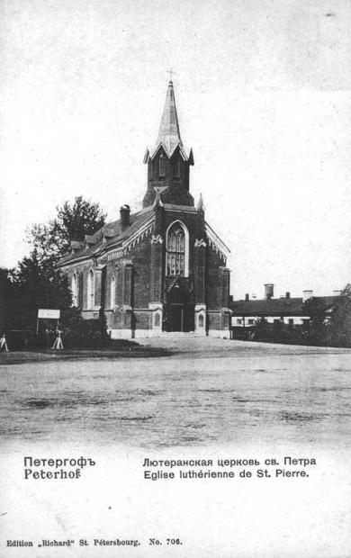 Лютеранская церковь Петергоф